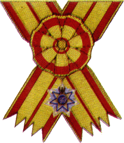 Орден Звезды Индонезии третьего класса